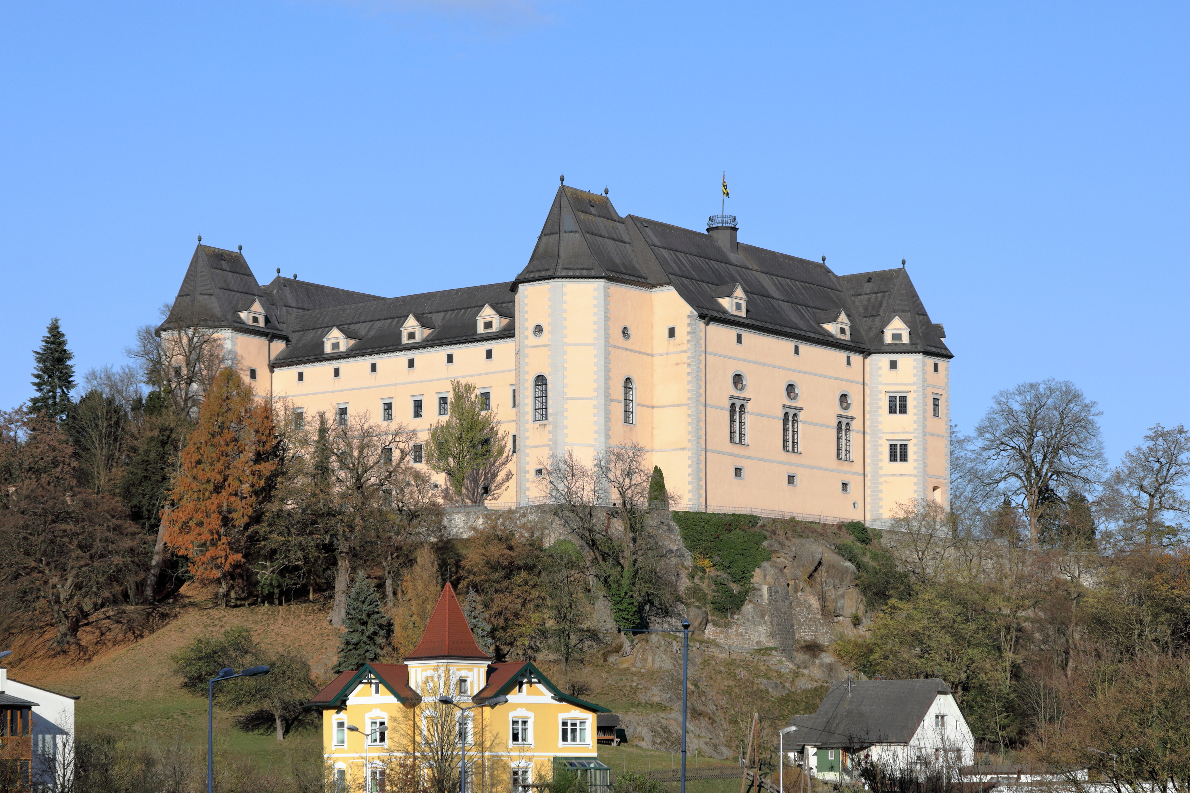 Südwestansicht des Schlosses Greinburg in der oberösterreichischen Stadtgemeinde Grein. Ein spätgotischer vierflügeliger Bau in beherrschender Lage, unmittelbar an der Donau im Strudengau.